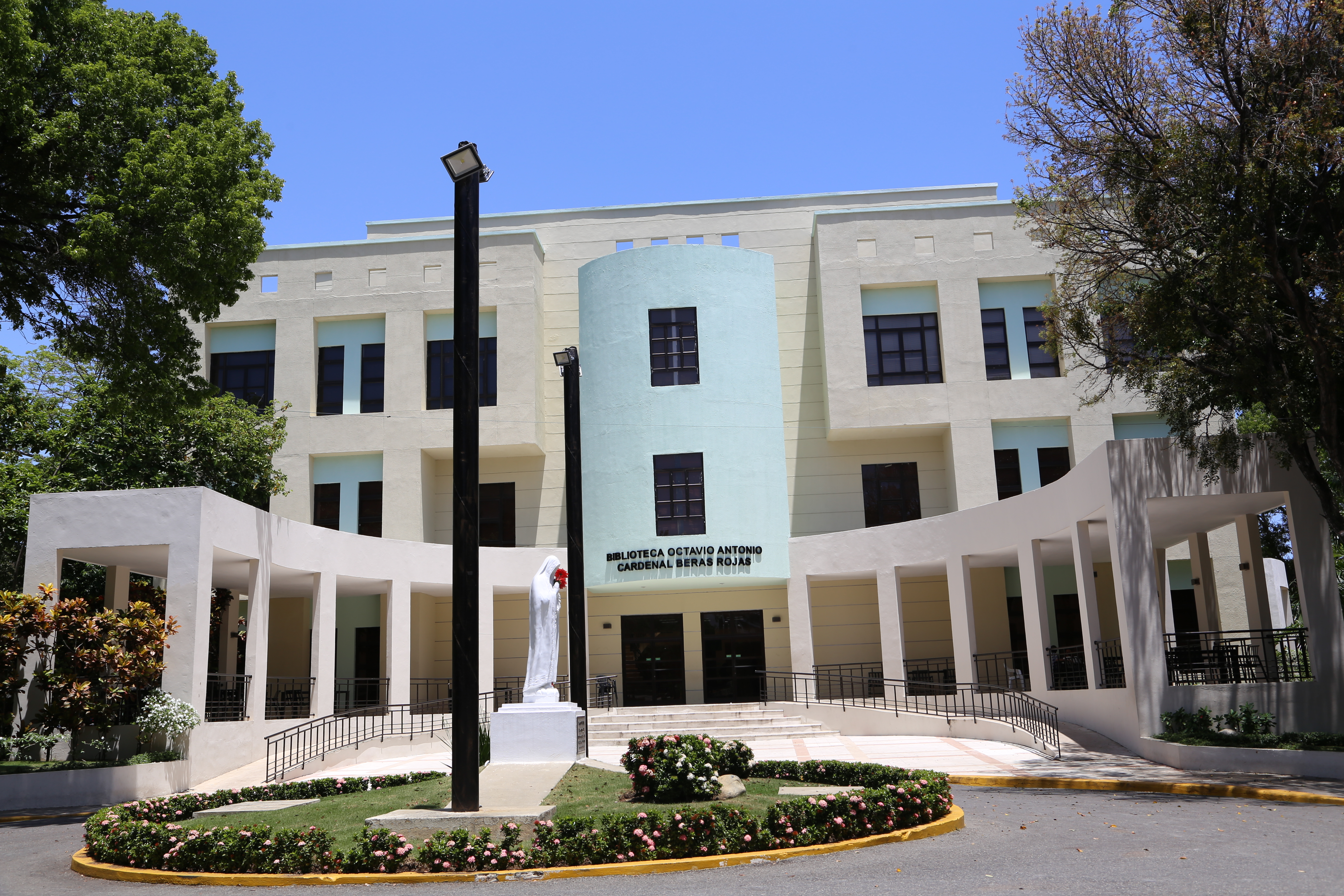 Vista panorámica de la Biblioteca de la Universidad Católica Santo Domingo